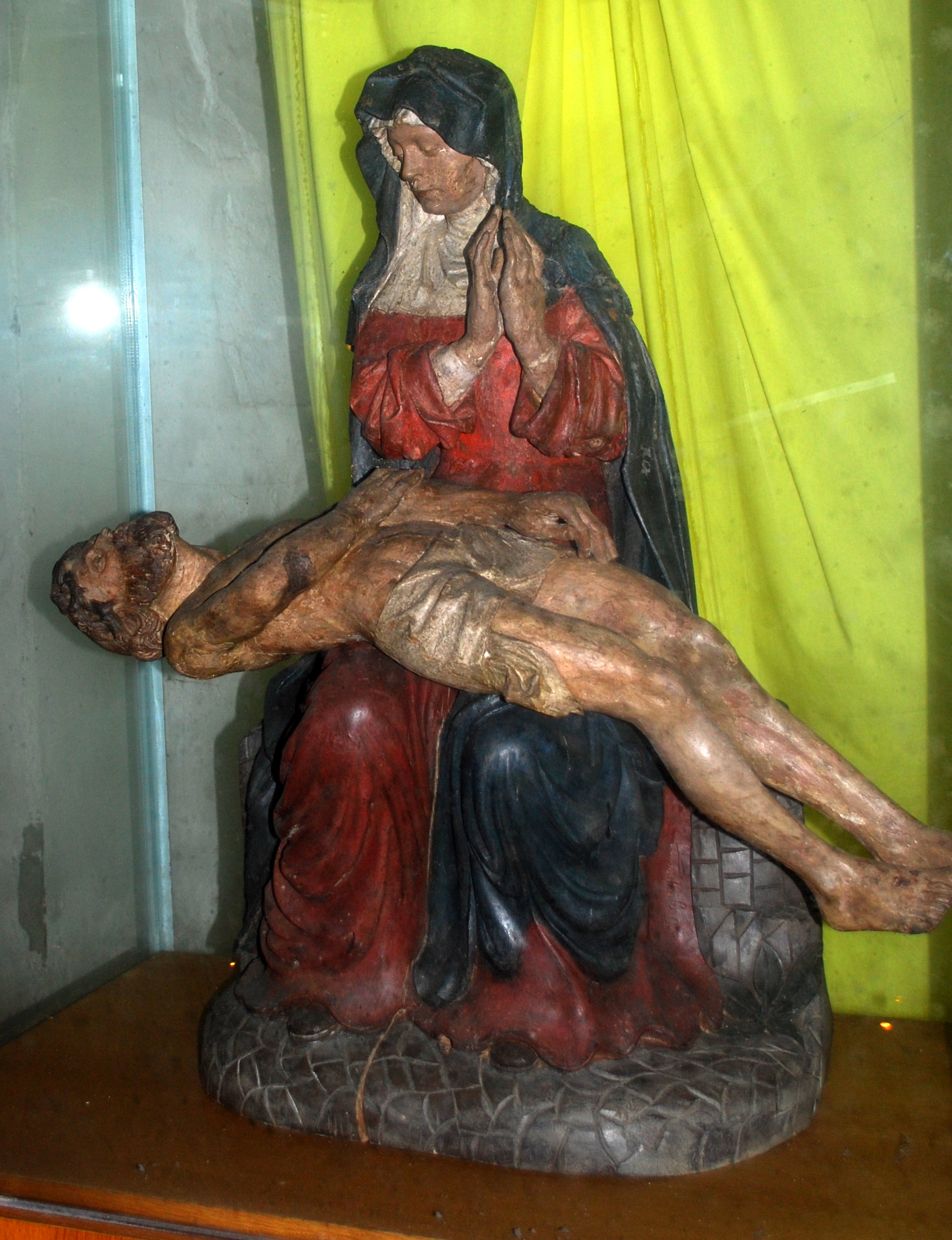 Capbreton église St Nicolas